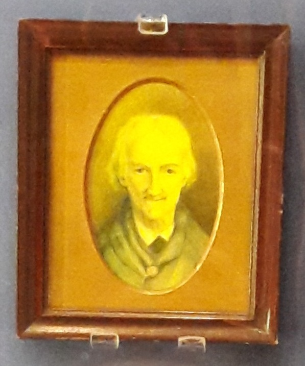 Museo Histórico Nacional - miniatura en mármol de Macacha Güemes. Autor desconocido.